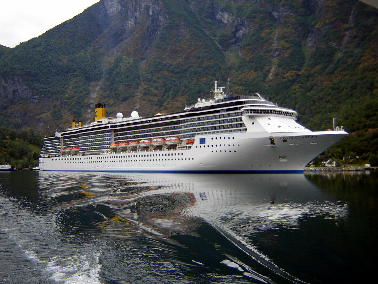 Лайнер Costa Atlantica DSC09523